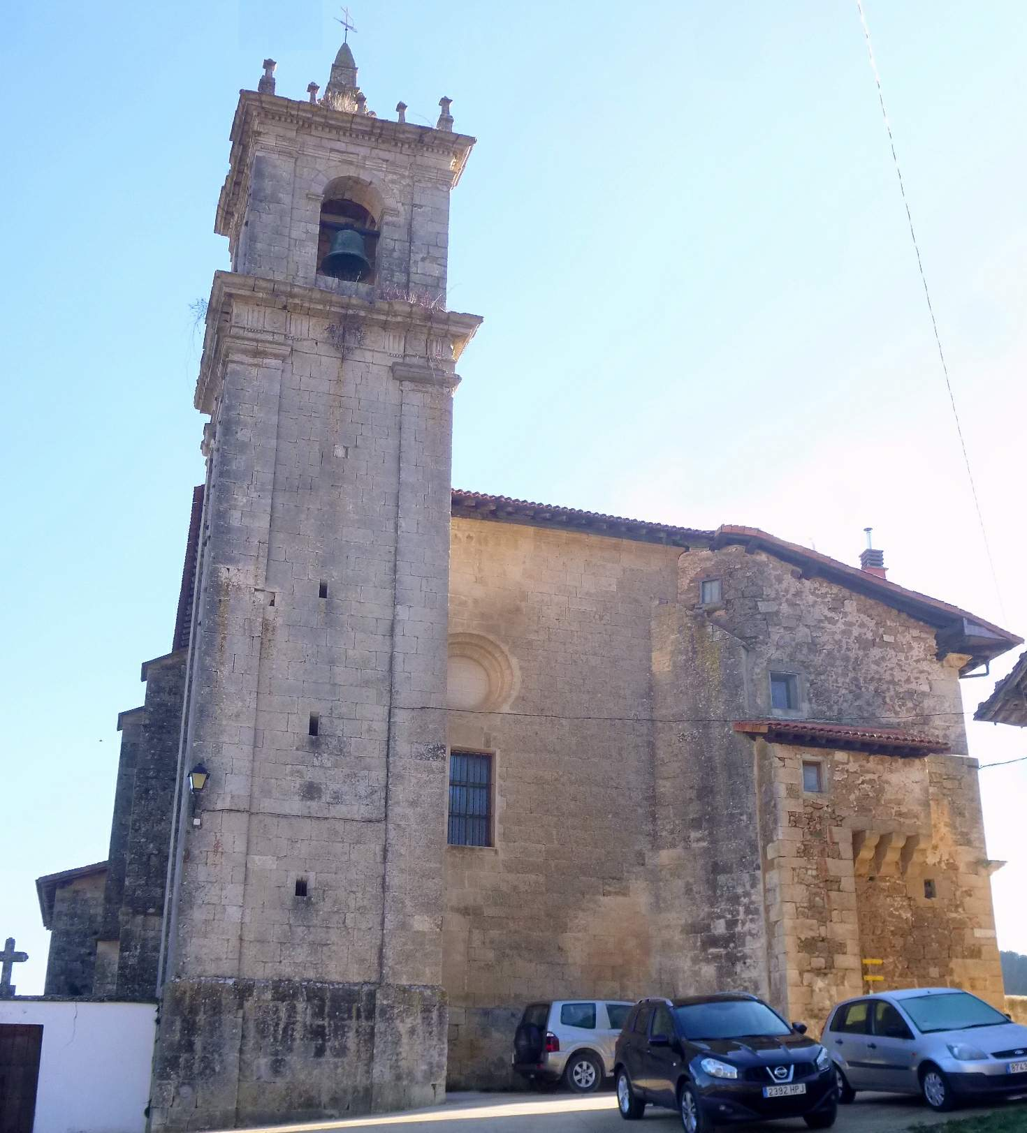 Iglesia de la Asunción de Nuestra Señora (Apellániz, Álava)